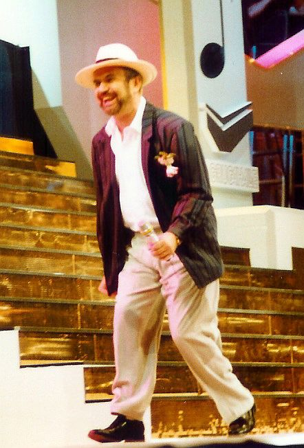 Drafi Deutscher, german Schlager singer (Marmor, Stein und Eisen bricht)